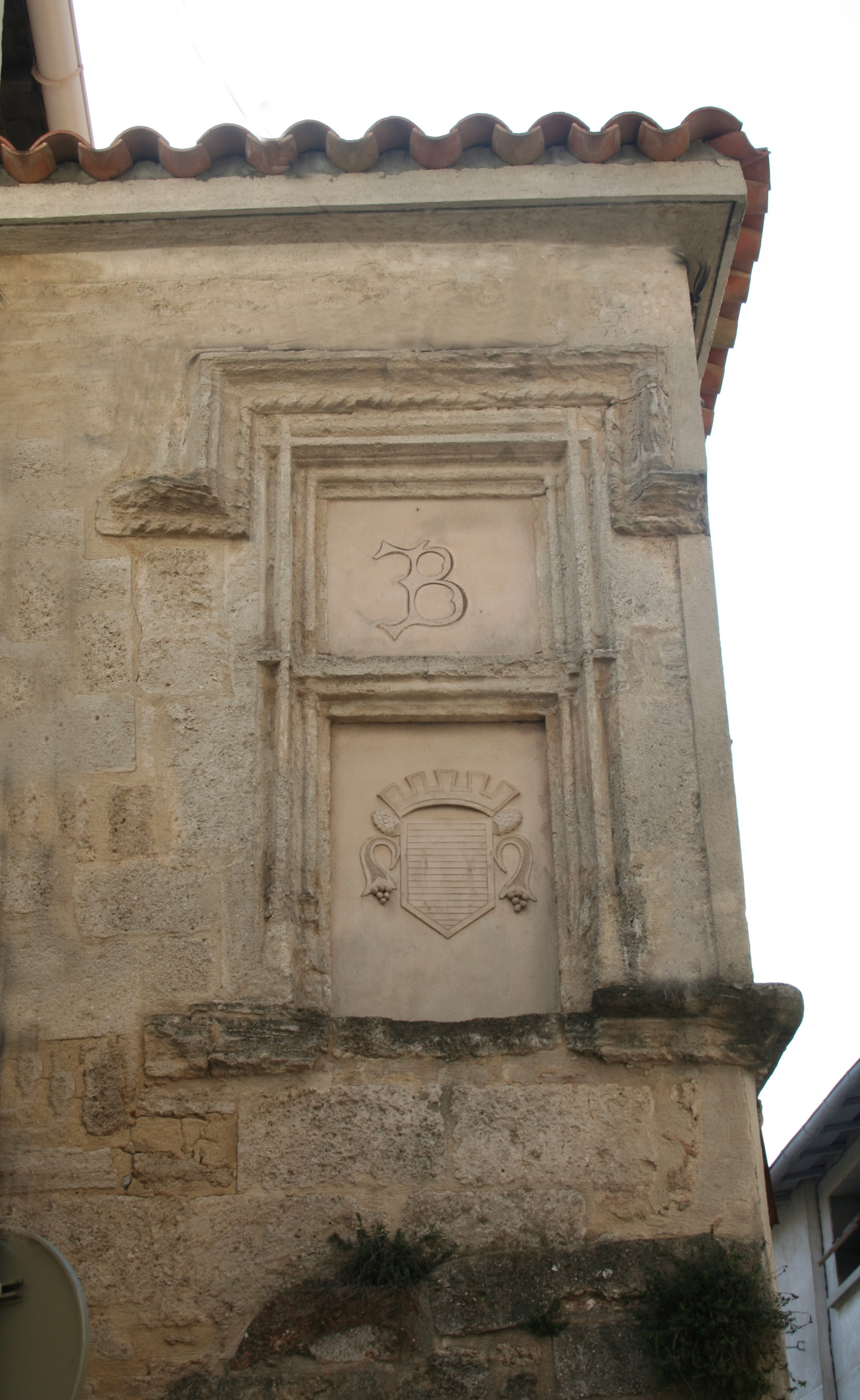 Pignan (Hérault) - fenêtre, Grand'Rue du Réveil Pignanais.